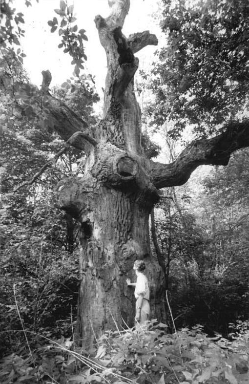 Güldendorf, Eichenwald ADN-ZB Müller-28.7.1982-Zum Beitrag: Wieder Fasane an sonnigen Hängen - Stelldichein im Mühlental mit der Natur und ihren Beschützern. Jahrhundertealte unter Naturschutz stehende Eiche im Eichwald bei Güldendorf in der Nähe des Mühlentales, eines Landschaftsschutzgebietes vor den Toren der Stadt Frankfurt-Oder. (Bitte beachten Sie hierzu auch 1982-0728-300N, 302N, 303N)